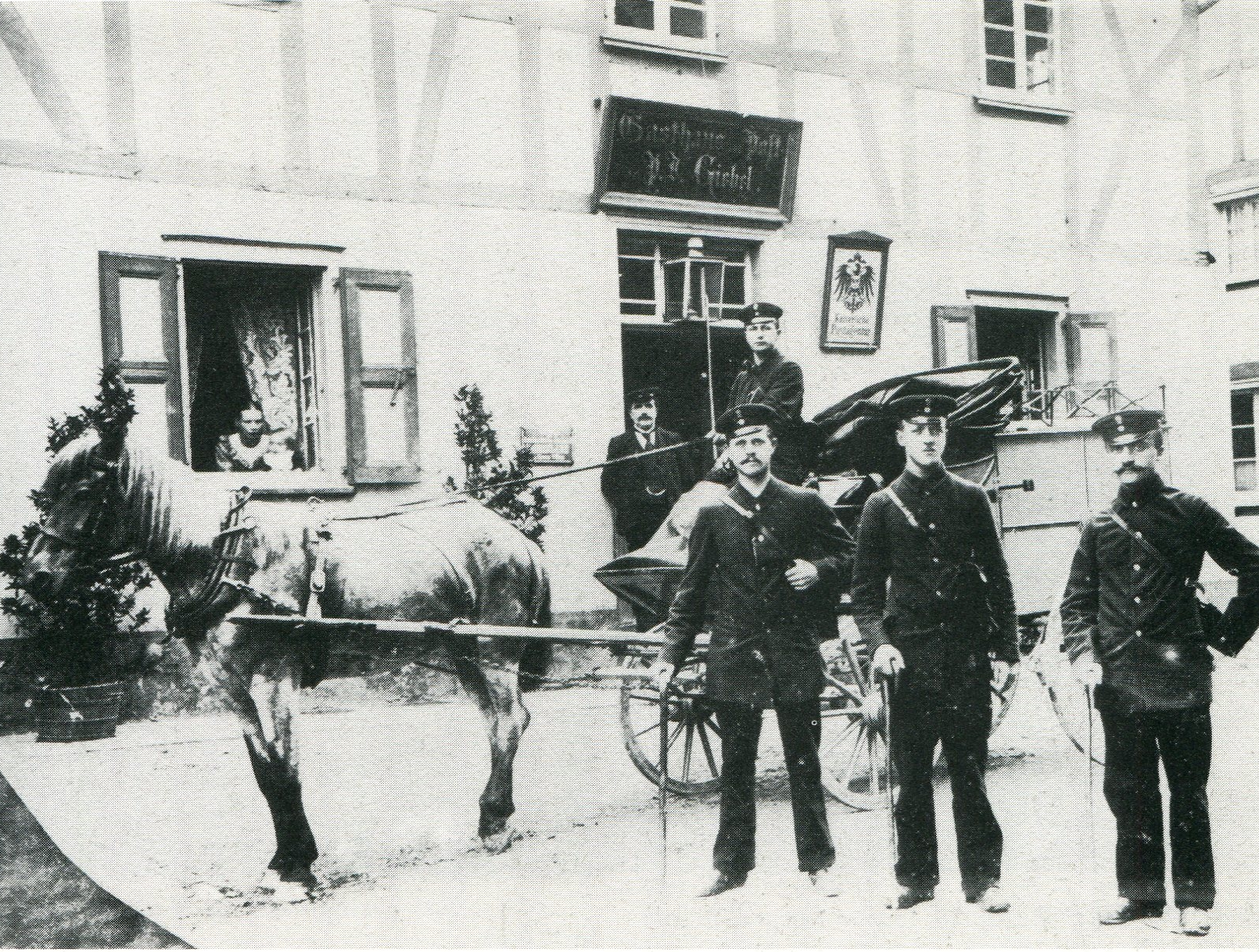 Foto von der Königlichen Postagentur in Overath im Bergischen Land von 1890. Mit Postkutsche und Zustellern